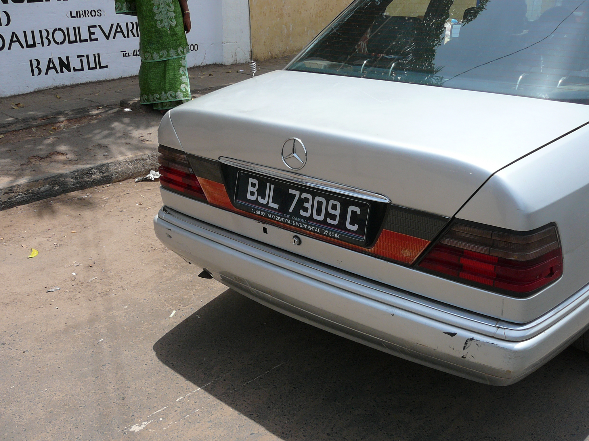 License plates